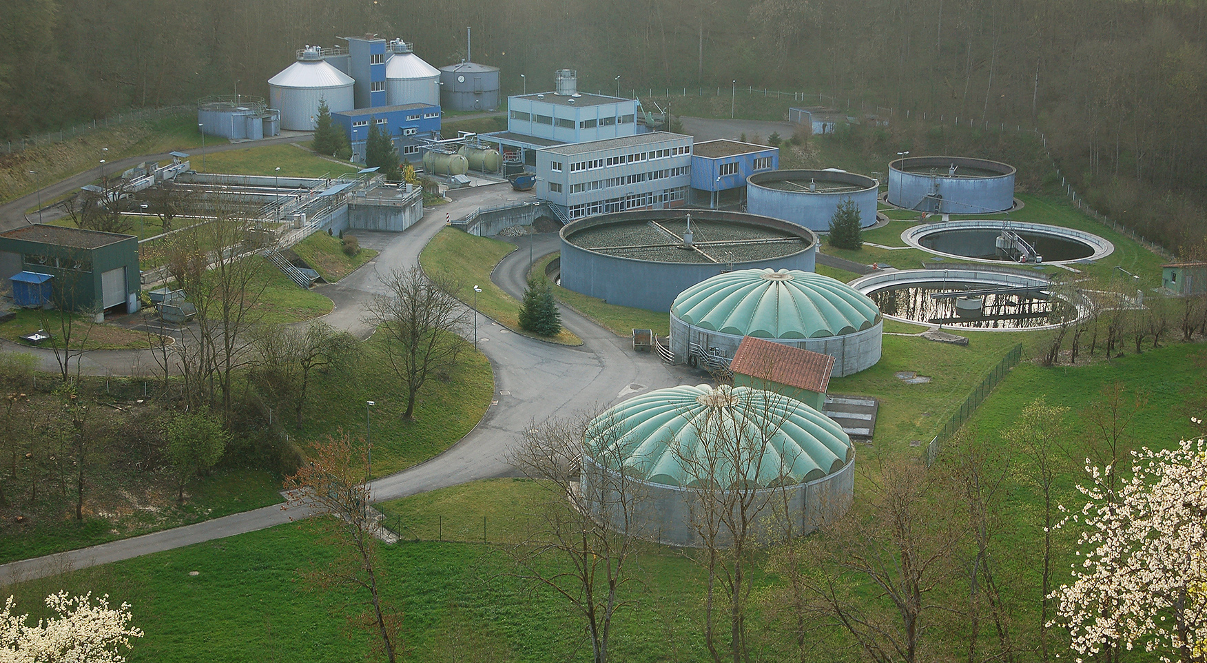 Gruppenklärwerk Leudelsbach bei Markgröningen (vom Rotenacker Wald aus gesehen)